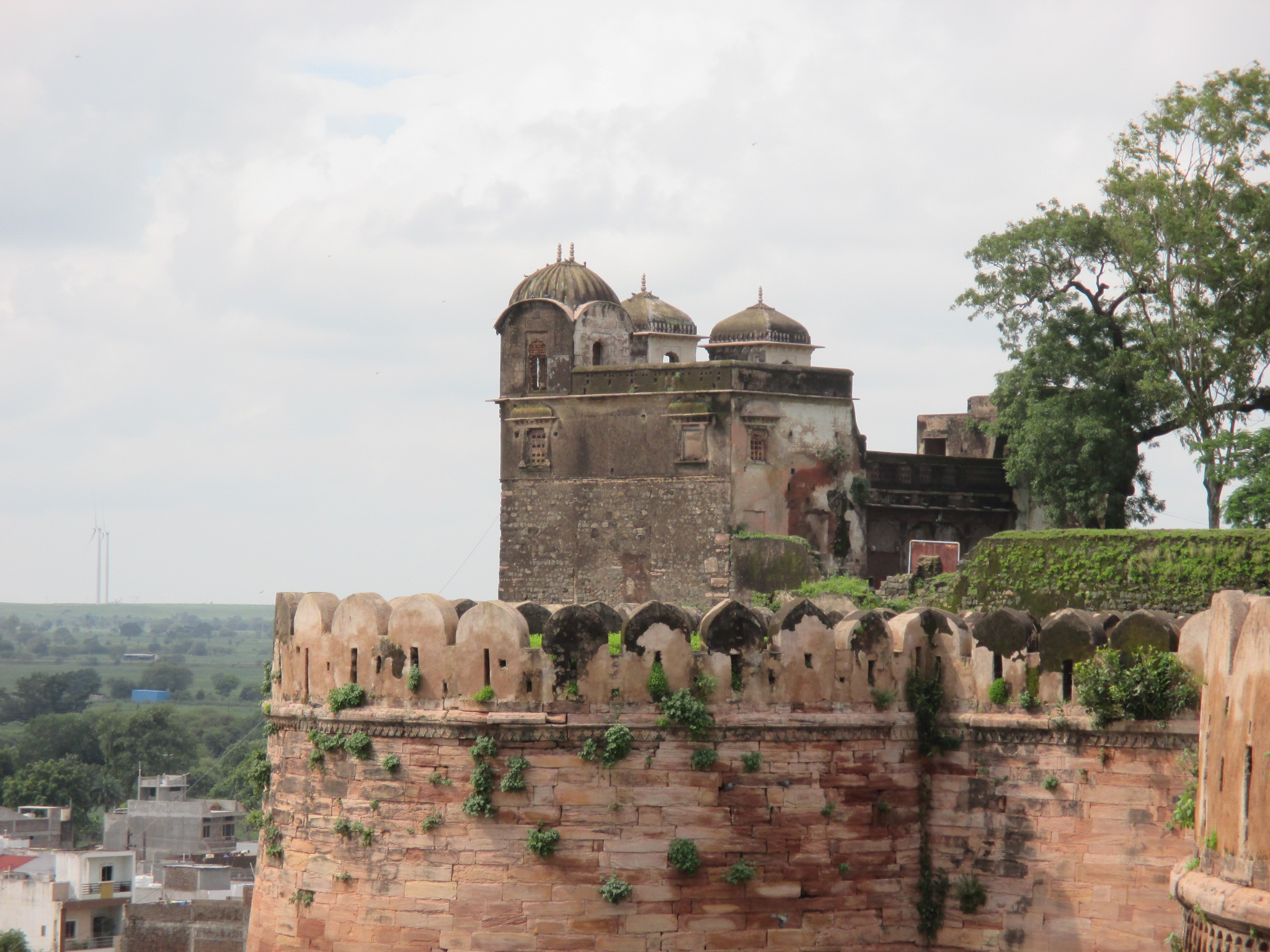 Kharbuza Mahal, Dhar, Madhya Pradesh